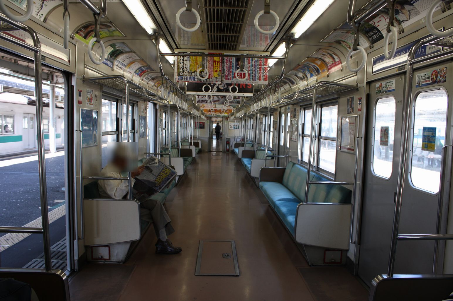 203系の車内